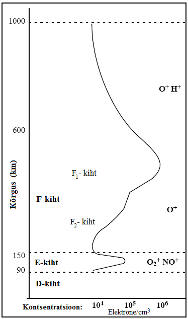 Kihtide nimetused, vabade elektronide kontsentratsiooni jaotus ja domineerivad ioonid erinevatel kõrgustel.